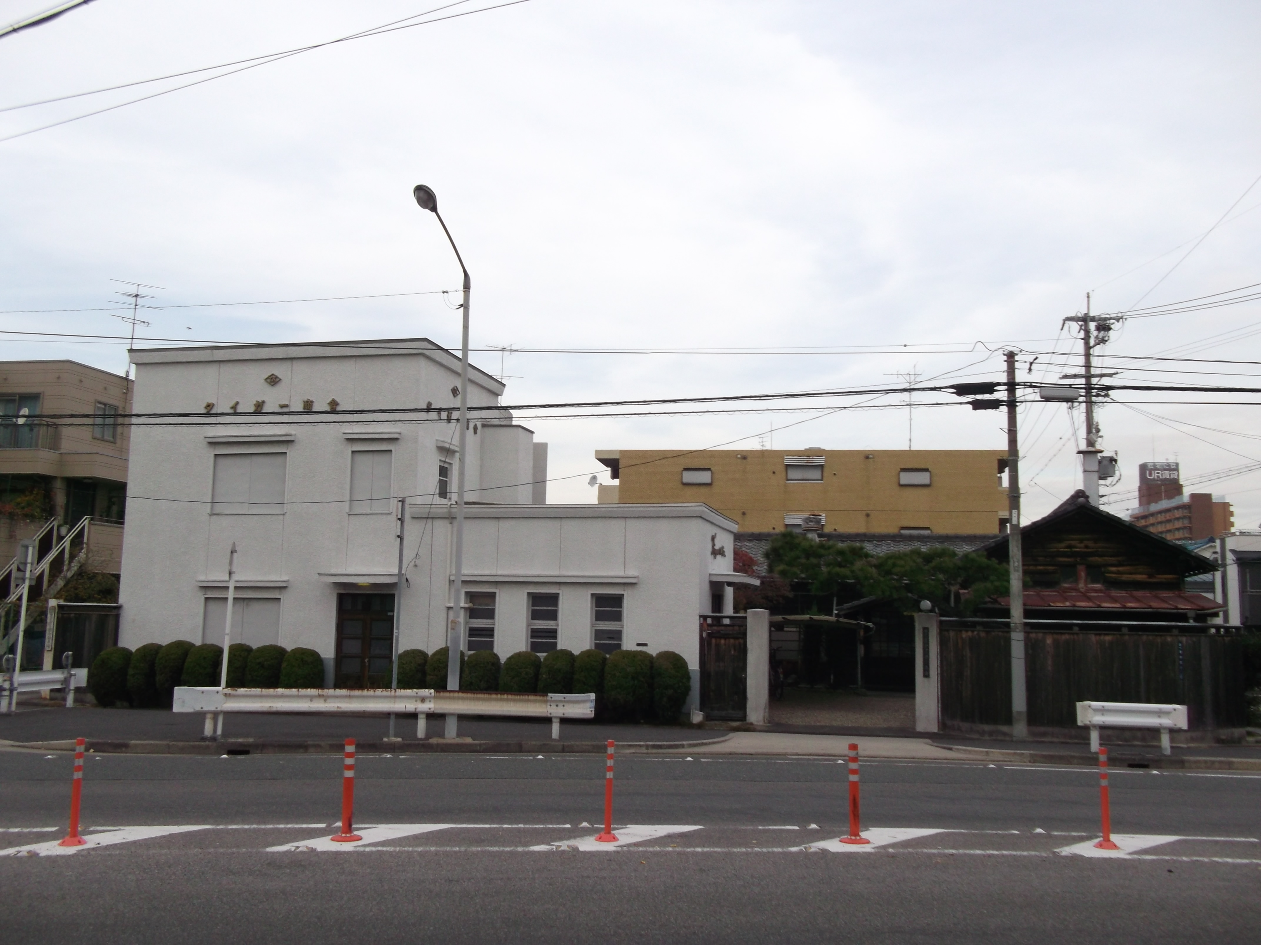 名古屋市千種区豊年町にあるタイガー商会本社を南側から写す。タイガー商会は「地球ゴマ」で知られる。